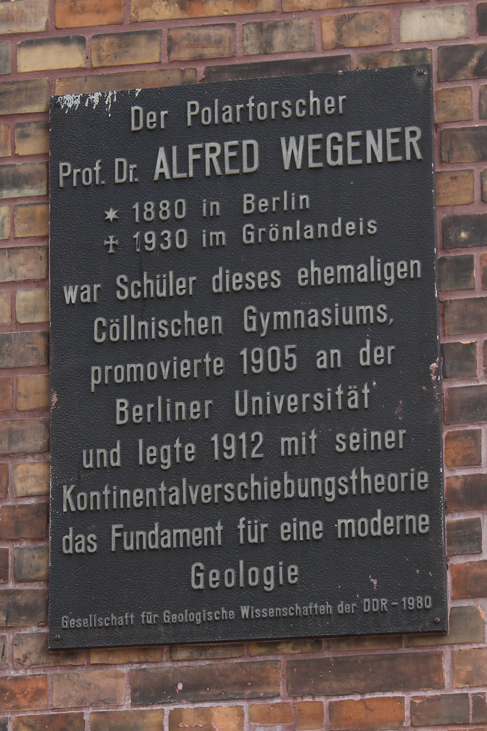 Gedenktafel von Professor Dr. Alfred Wegener an der Hauswand des ehemaligen Köllnischen Gymnasiums in Berlin, Wallstraße Ecke Neue Roßstraße.